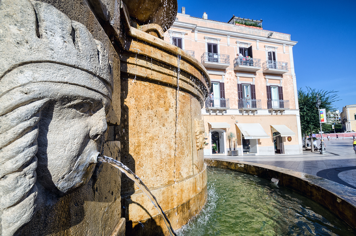 fontana Ferdinandea This is a photo of a monument which is part of cultural heritage of Italy.